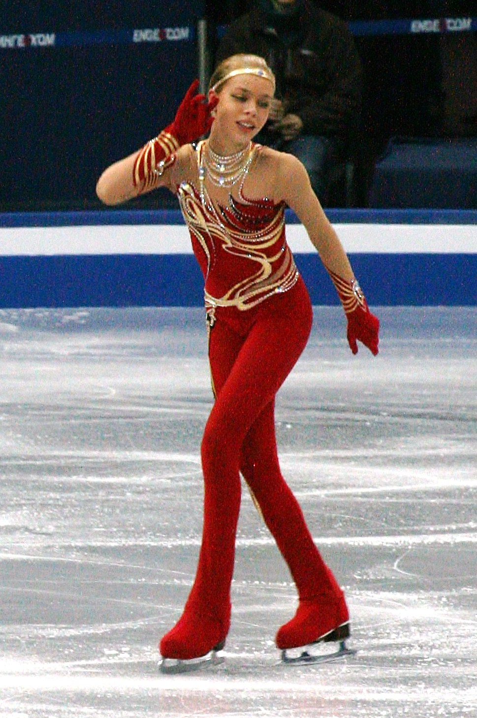 Анна Погорилая (Россия) на финале Гран-при среди юниоров 2012-2013. Короткая программа.